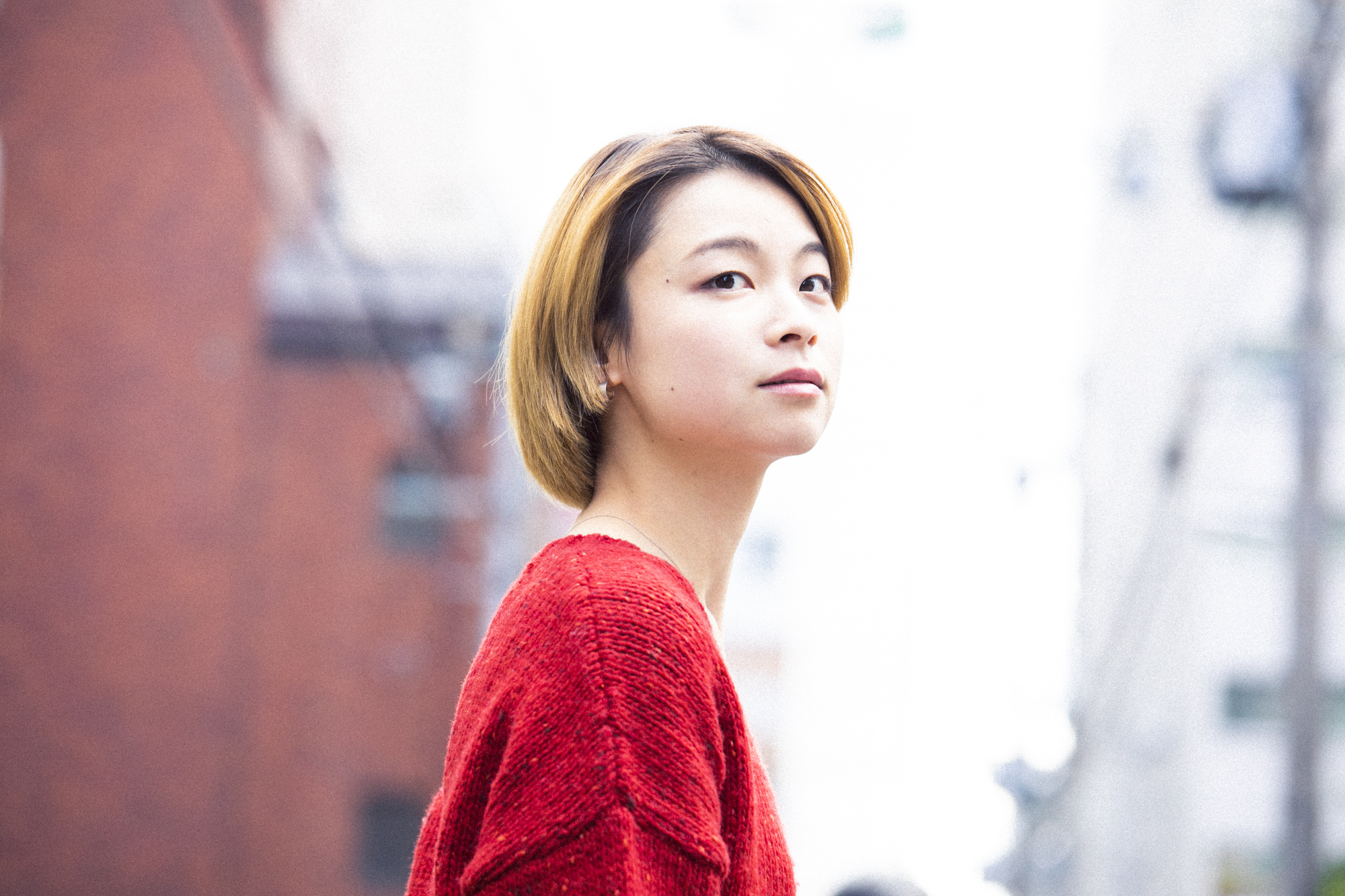 片平里菜